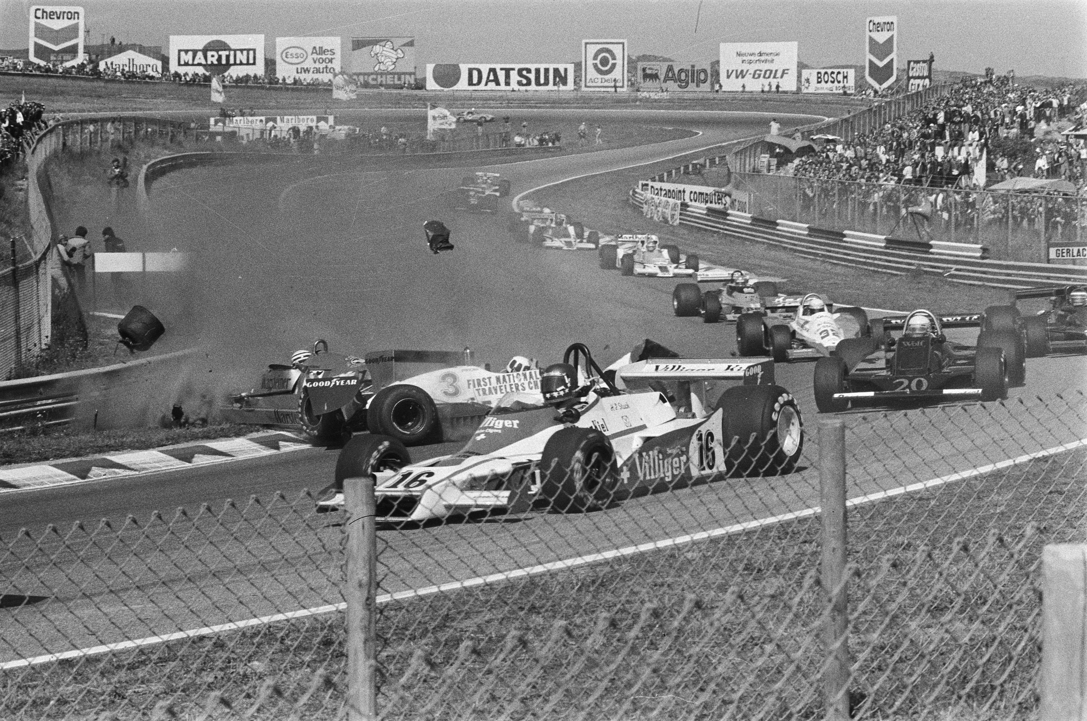 Grand Prix Zandvoort; botsing Patrese en Pironi (l).